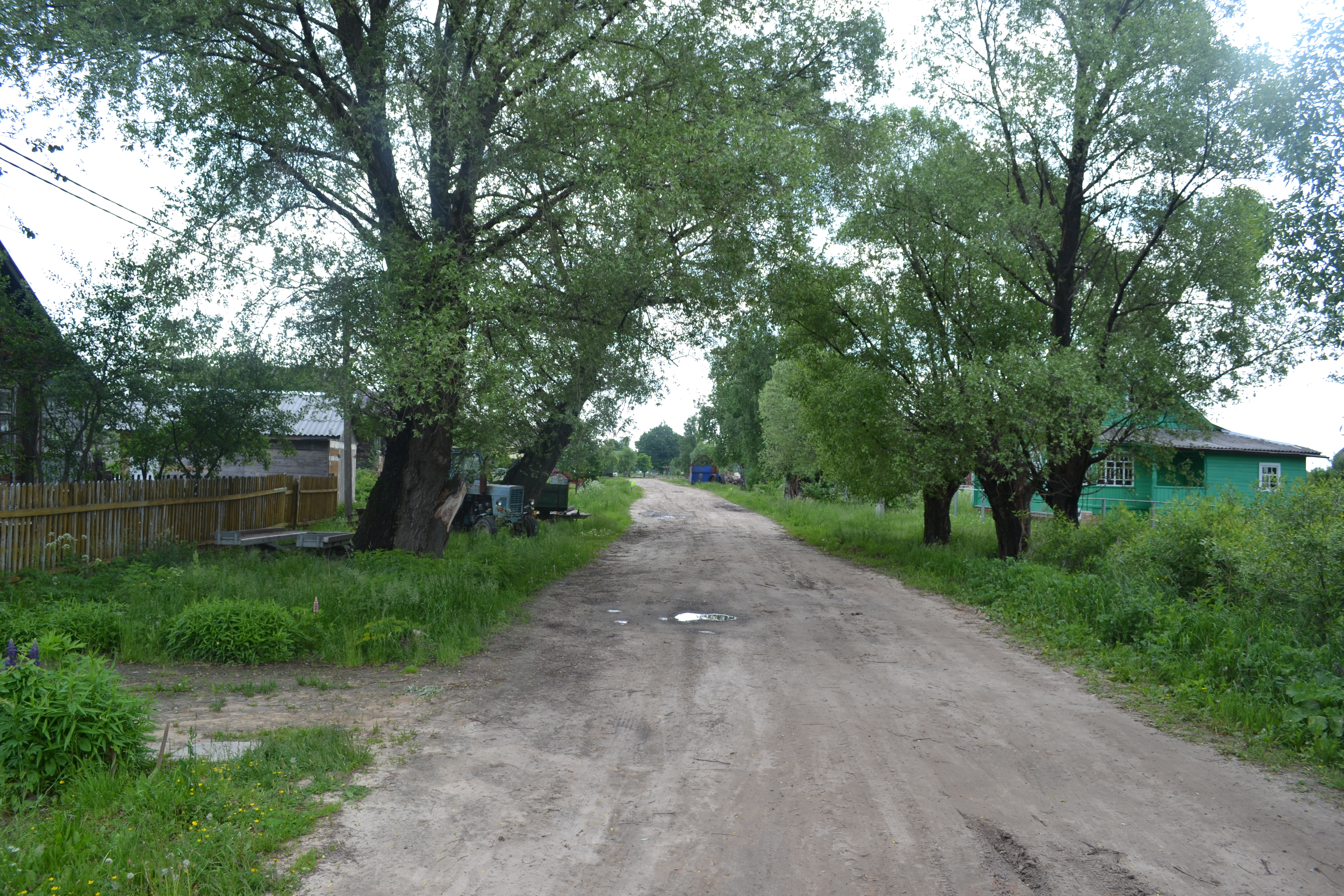 Въезд в деревню Чисома (Шатурский район)